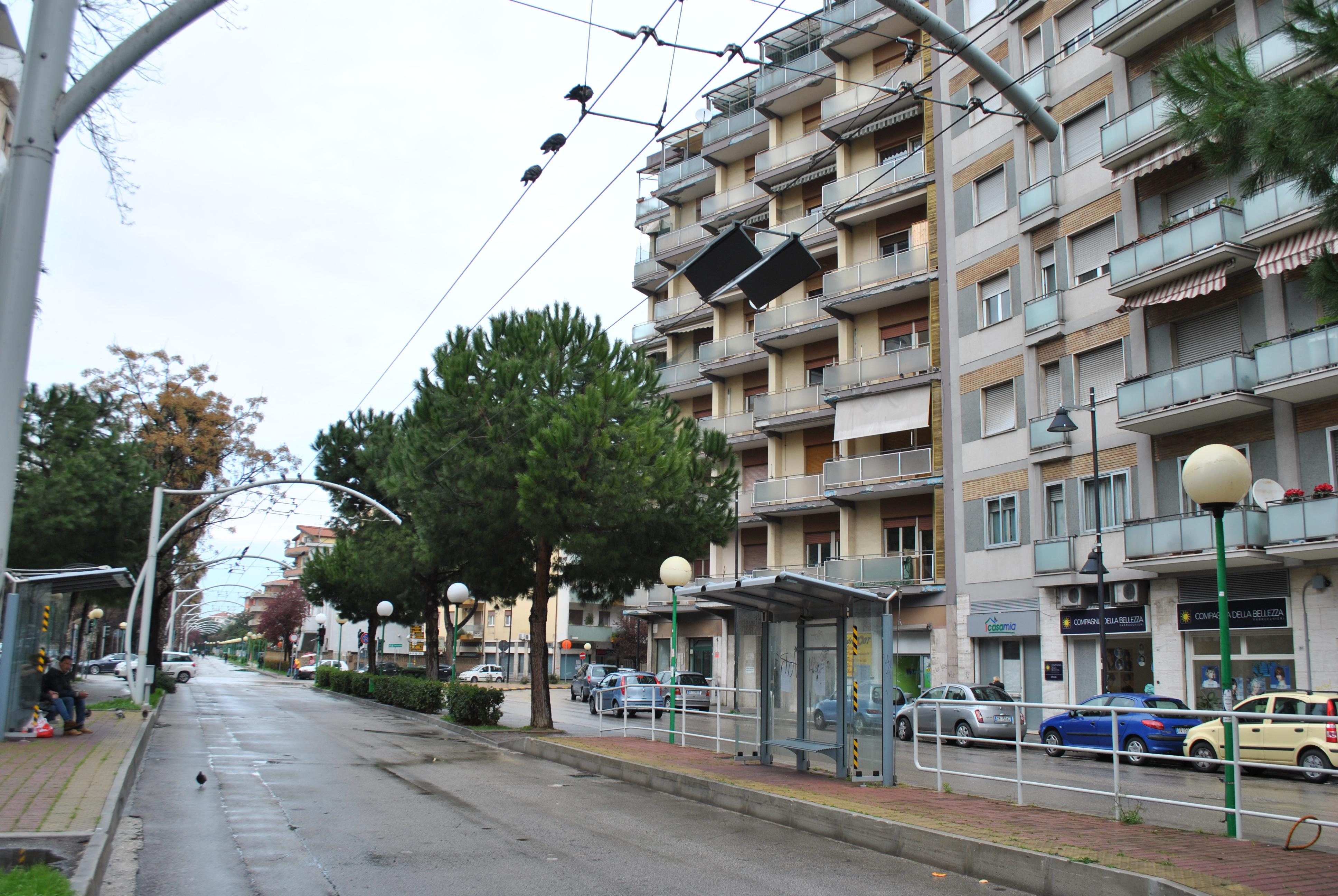 Fotografia della prevista fermata "Milite Ignoto" a Pescara